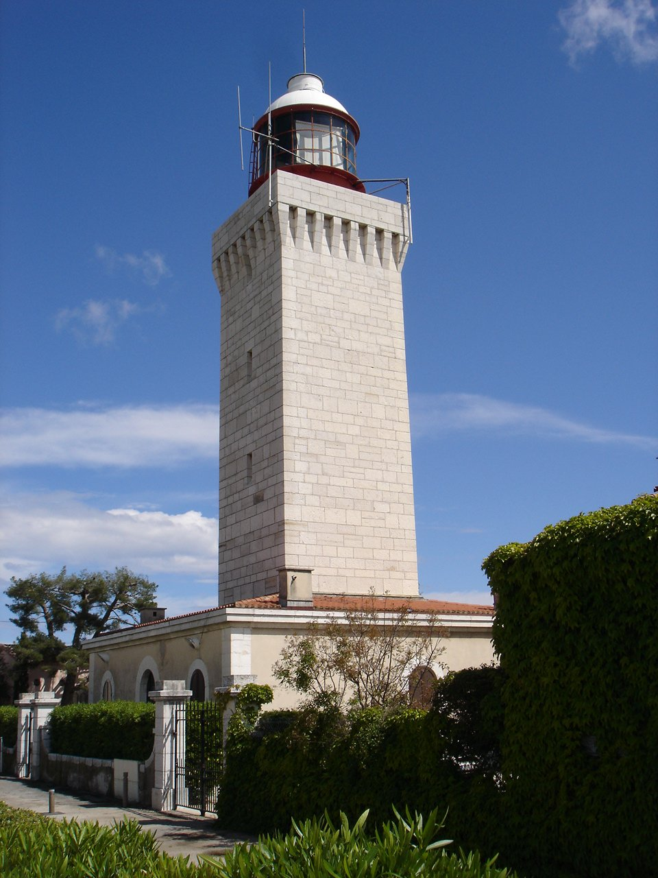 Photographie du phare de la Garoupe à Antibes (Alpes-Maritimes)